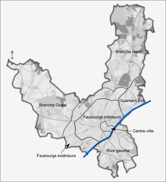 Découpage en grands ensembles géographiques des quartiers de Limoges, conformément à la division arbitraire effectuée dans l'article Quartiers de Limoges de la WP francophone.